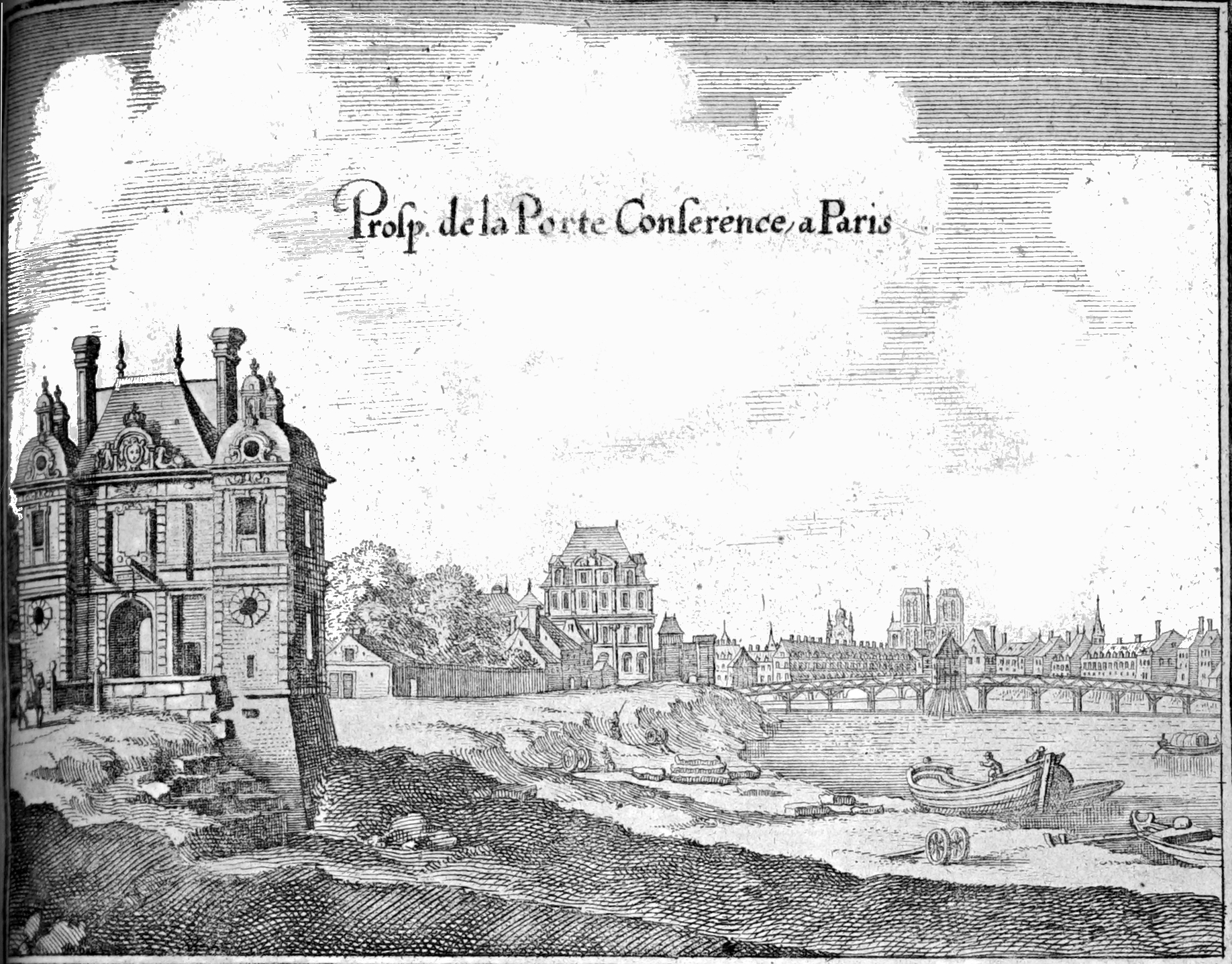 image venant de TOpographiae Galliae.